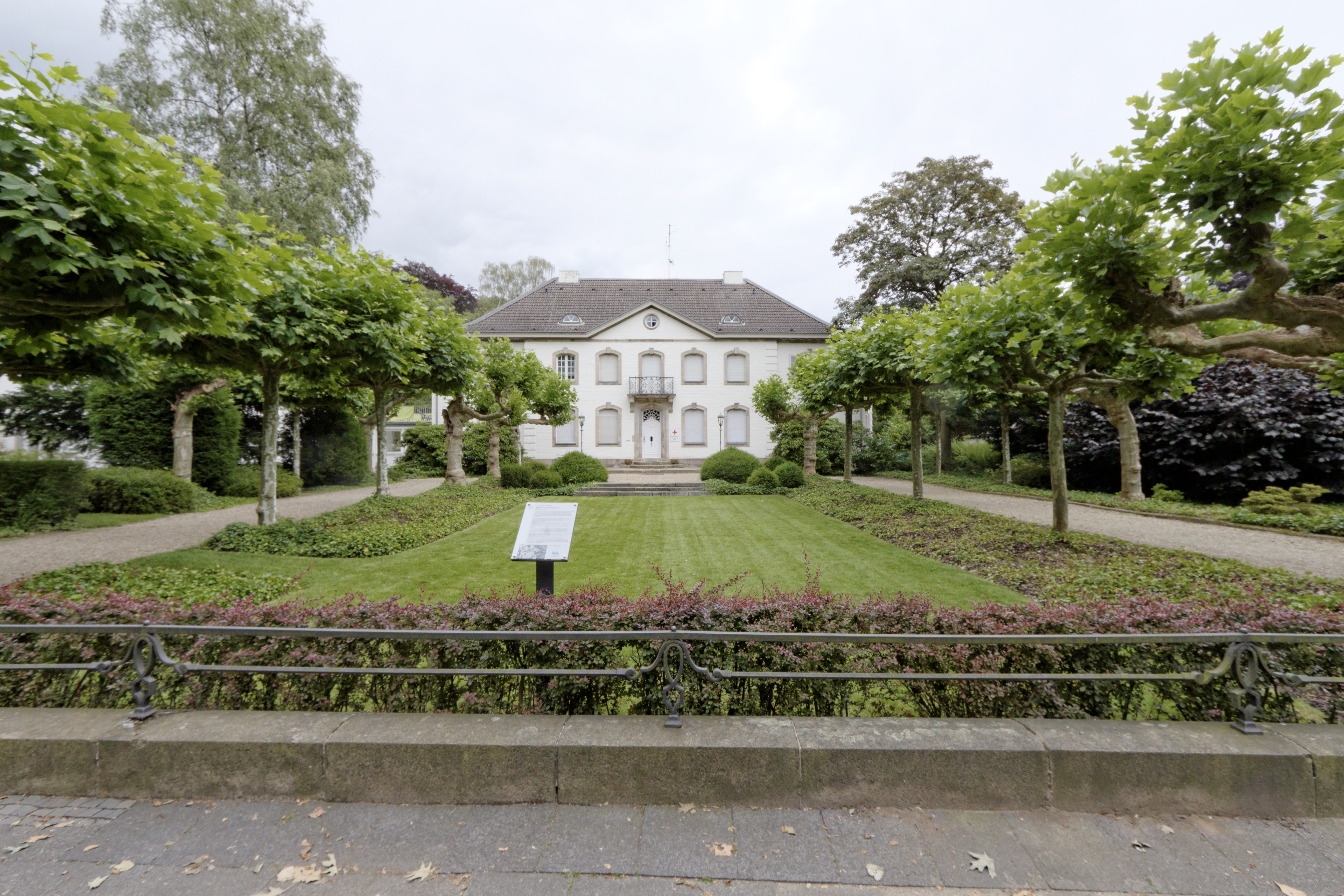 Krefeld, Hohenzollernstr. 91; Haus Rudolf Oetker (Textilfabrikant); Architekt: August Biebricher